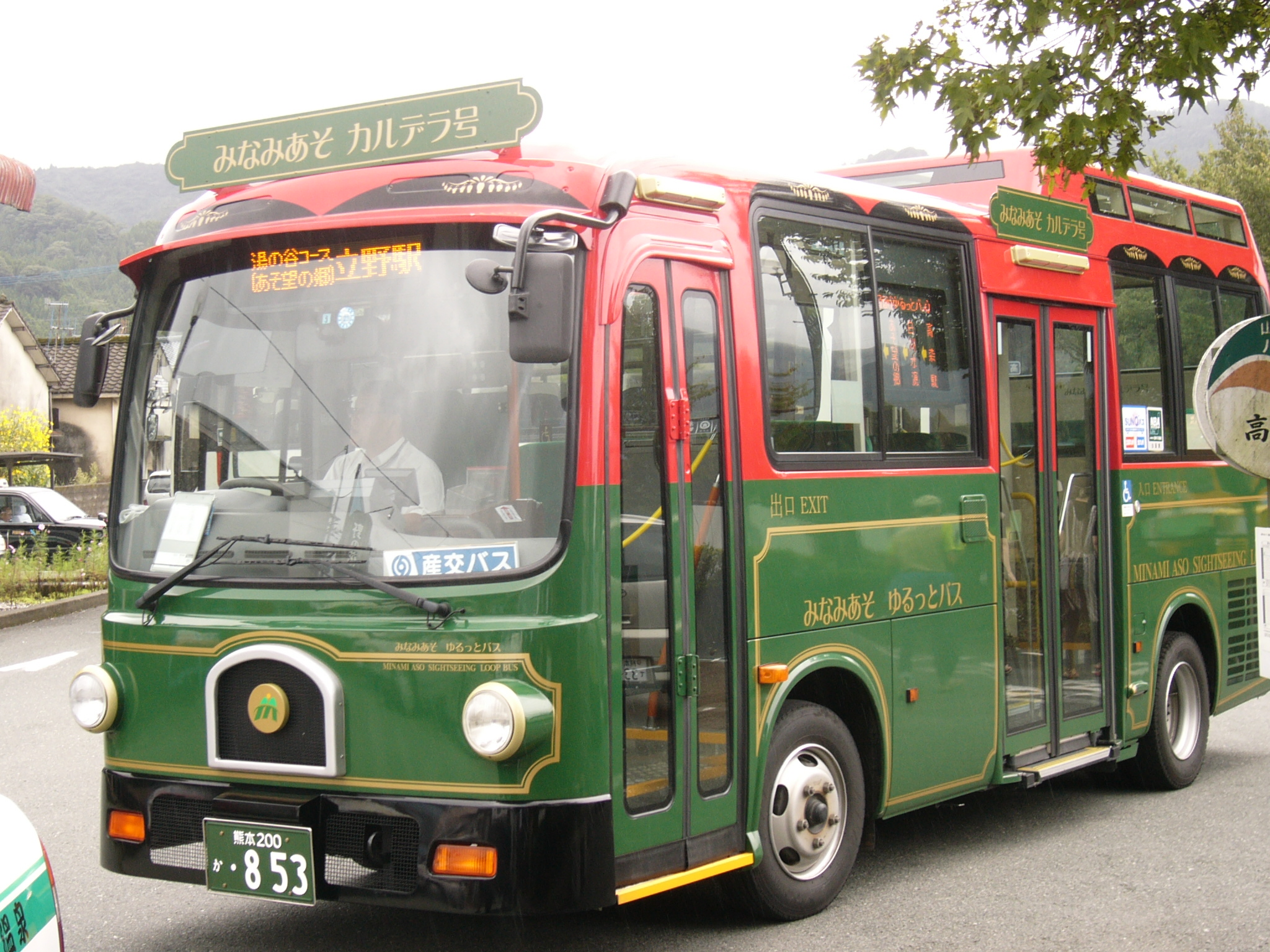 登録番号：熊本200か853（ゆるっとバス「みなみあそカルデラ号」） 撮影場所：高森駅にて